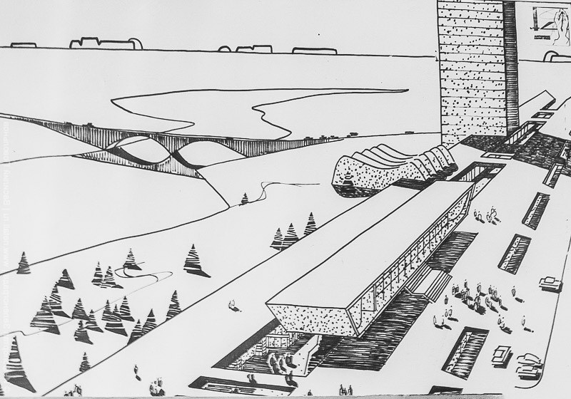 Рисунок, музей Зеленограда